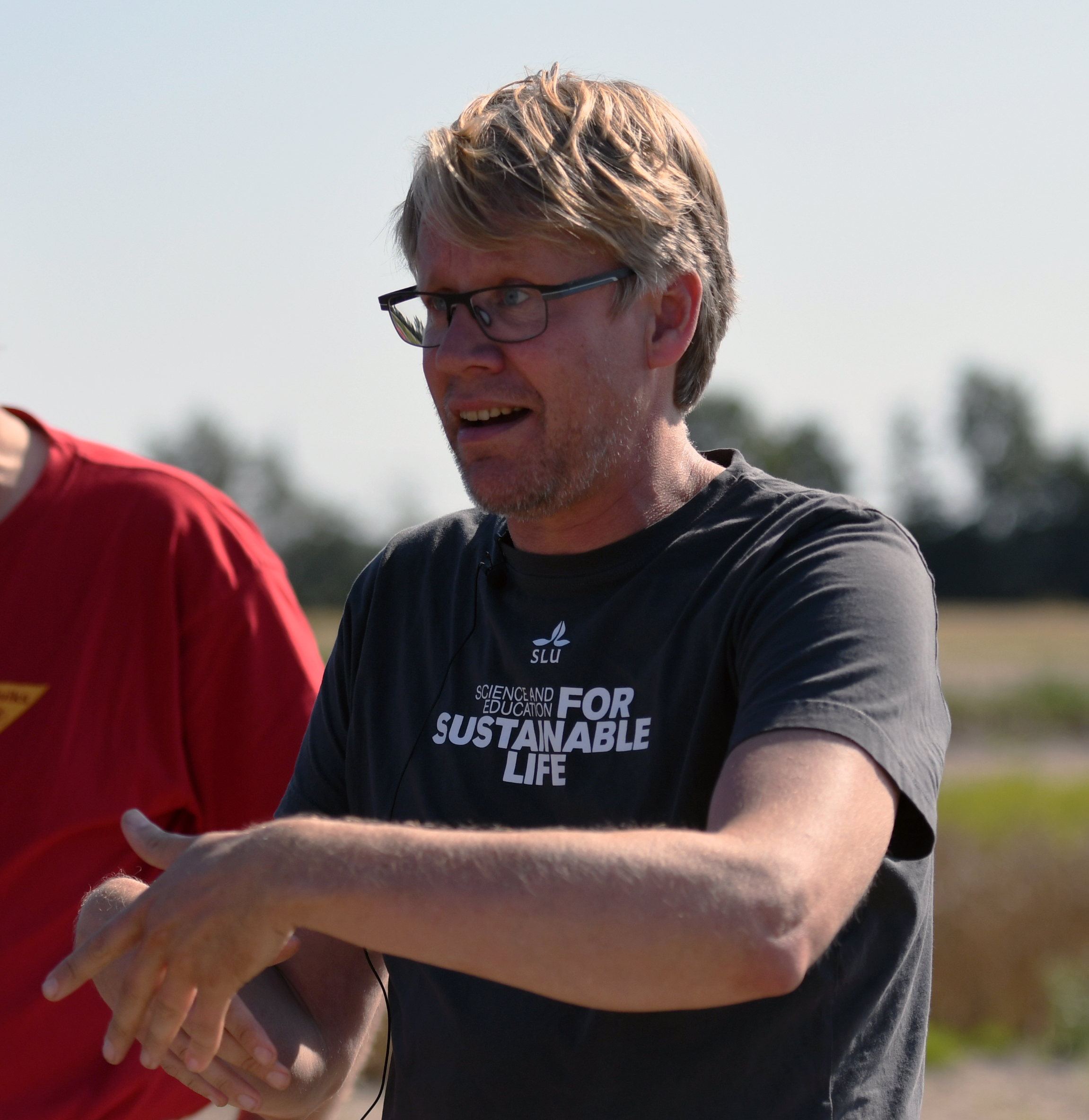 Sveriges Lantbruksuniversitet visar upp sina försökspotatisodlingar för allmänheten. Professor Erik Andreasson svarar på frågor.